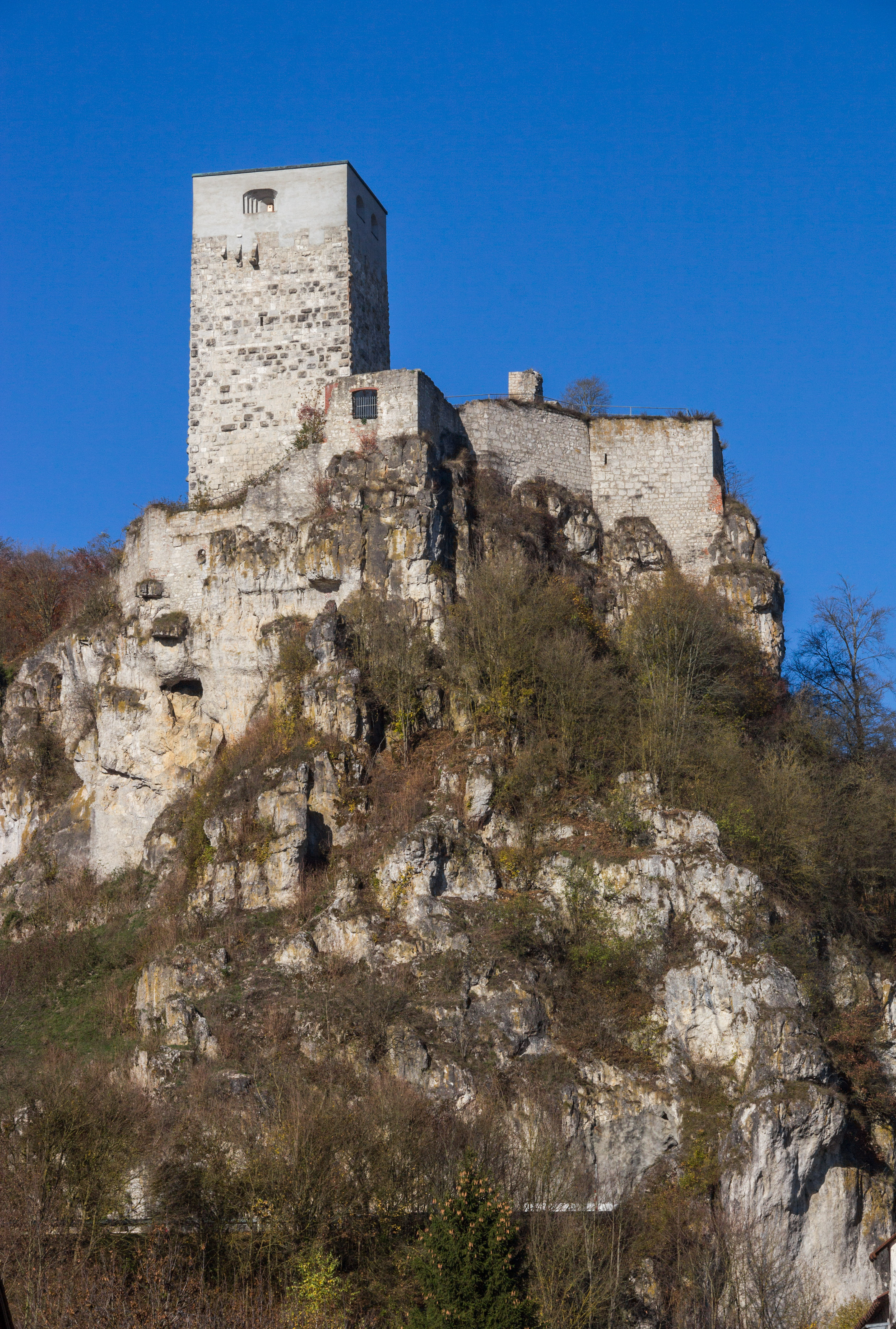 Burg Wellheim, Wellheim